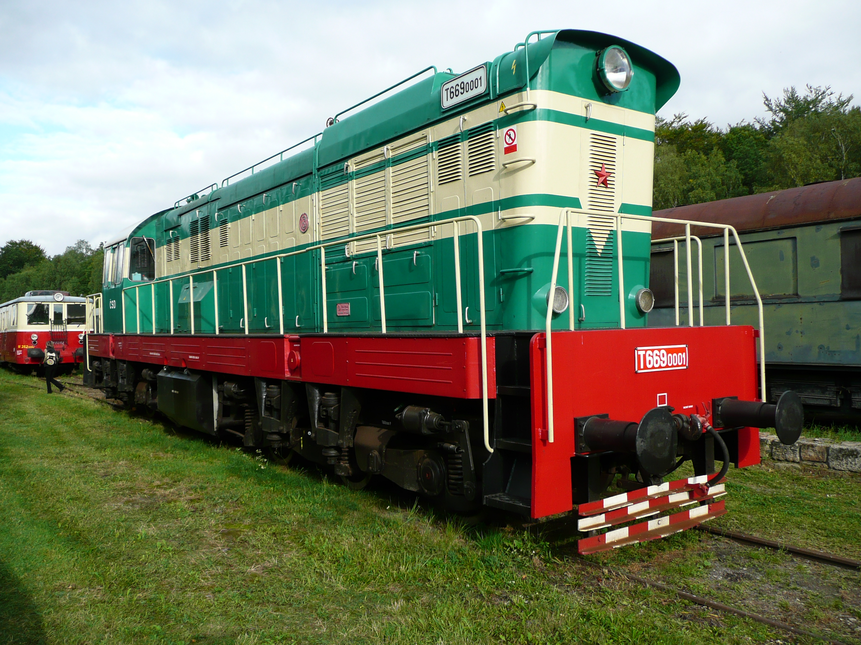 T 669.0001 im Eisenbahnmuseum Lužná u Rakovníka